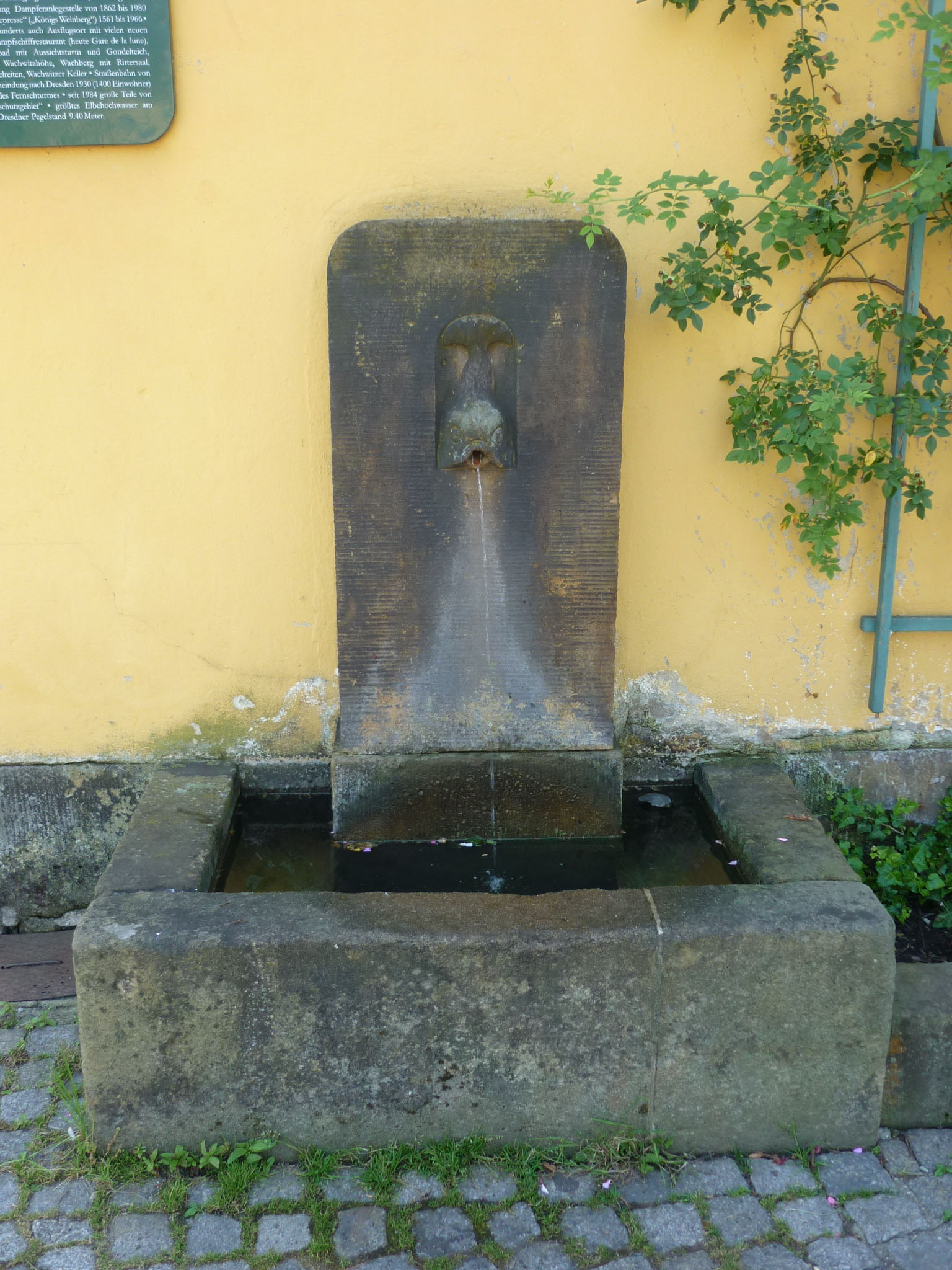 Delphinbrunnen Wachwitz